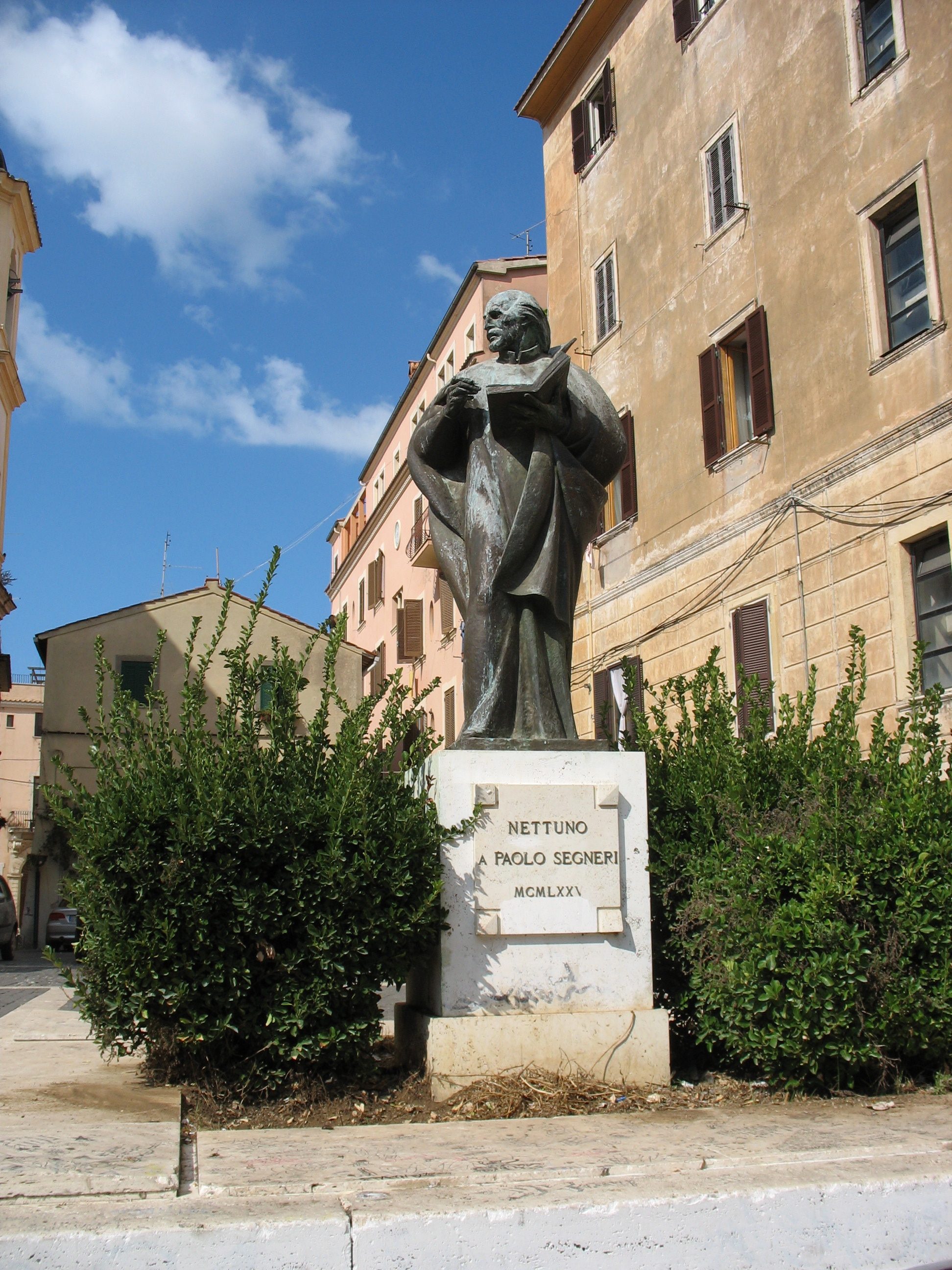 stefano, foto mia, statua di segneri a nettuno, GFDL